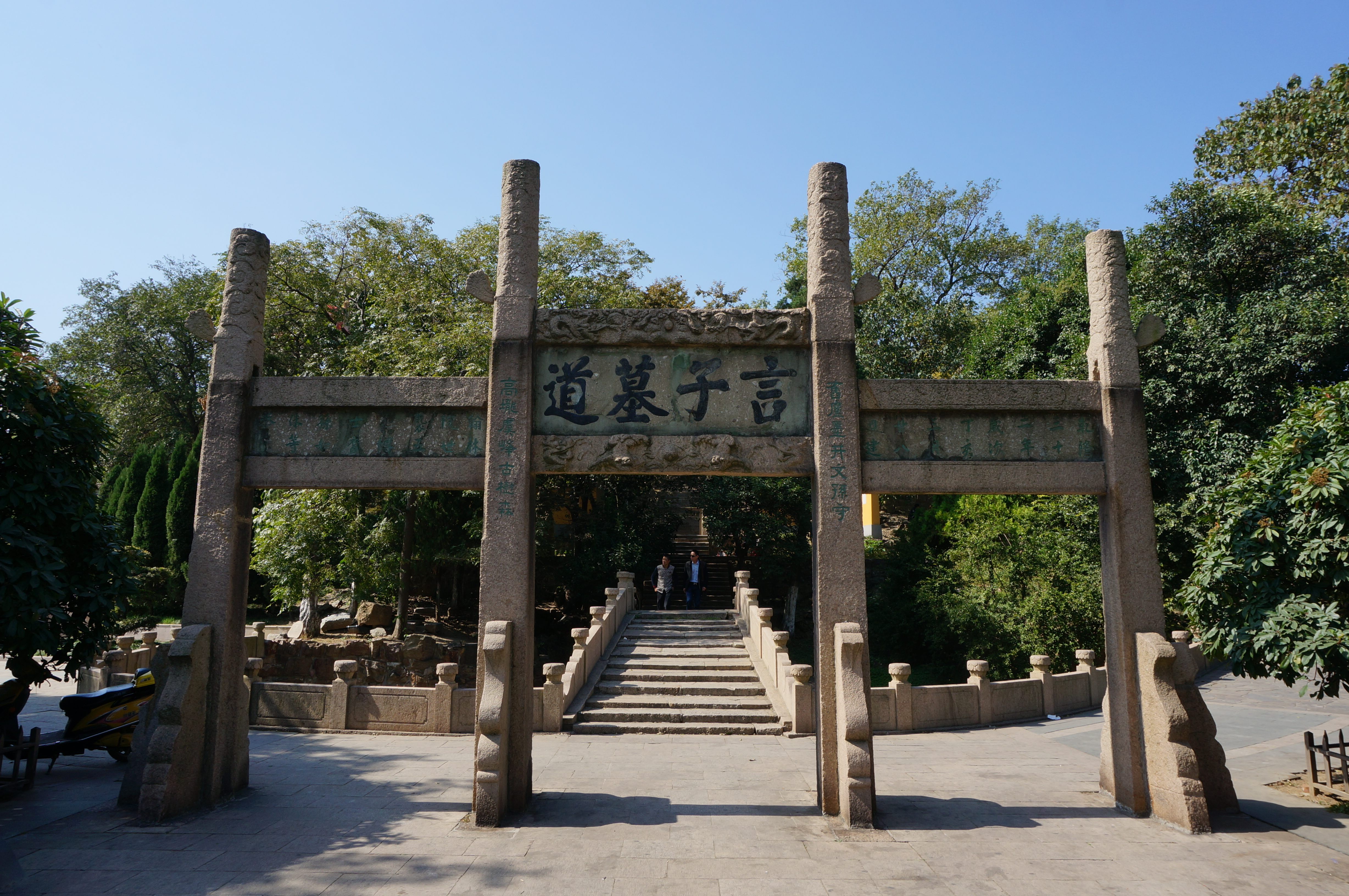 言子墓，第一道牌坊正面。